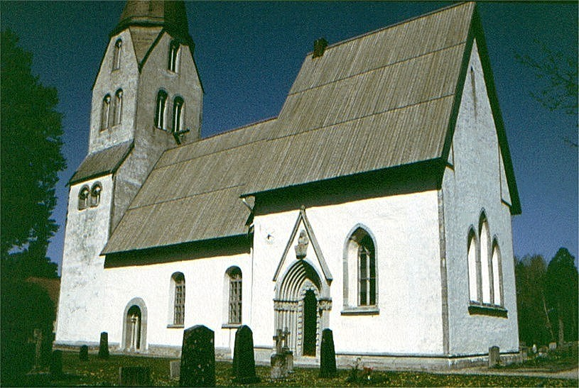 Lye kyrka i Gotland, Sverige. Lye kirke